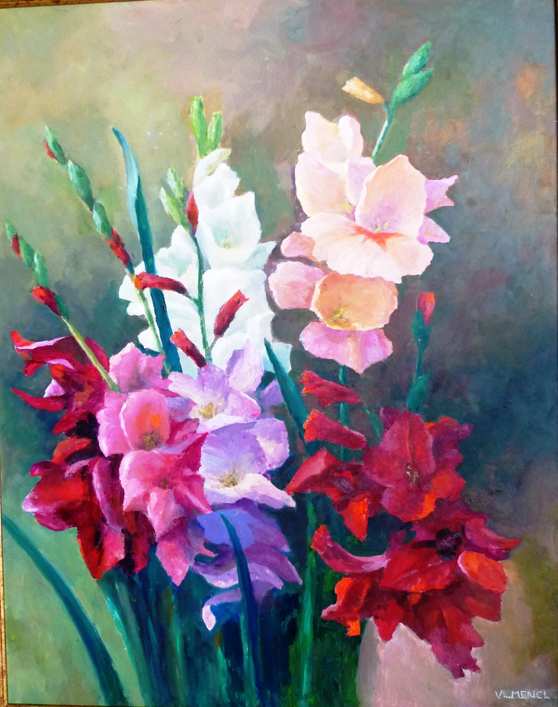 Vladimír Mencl dílo 05